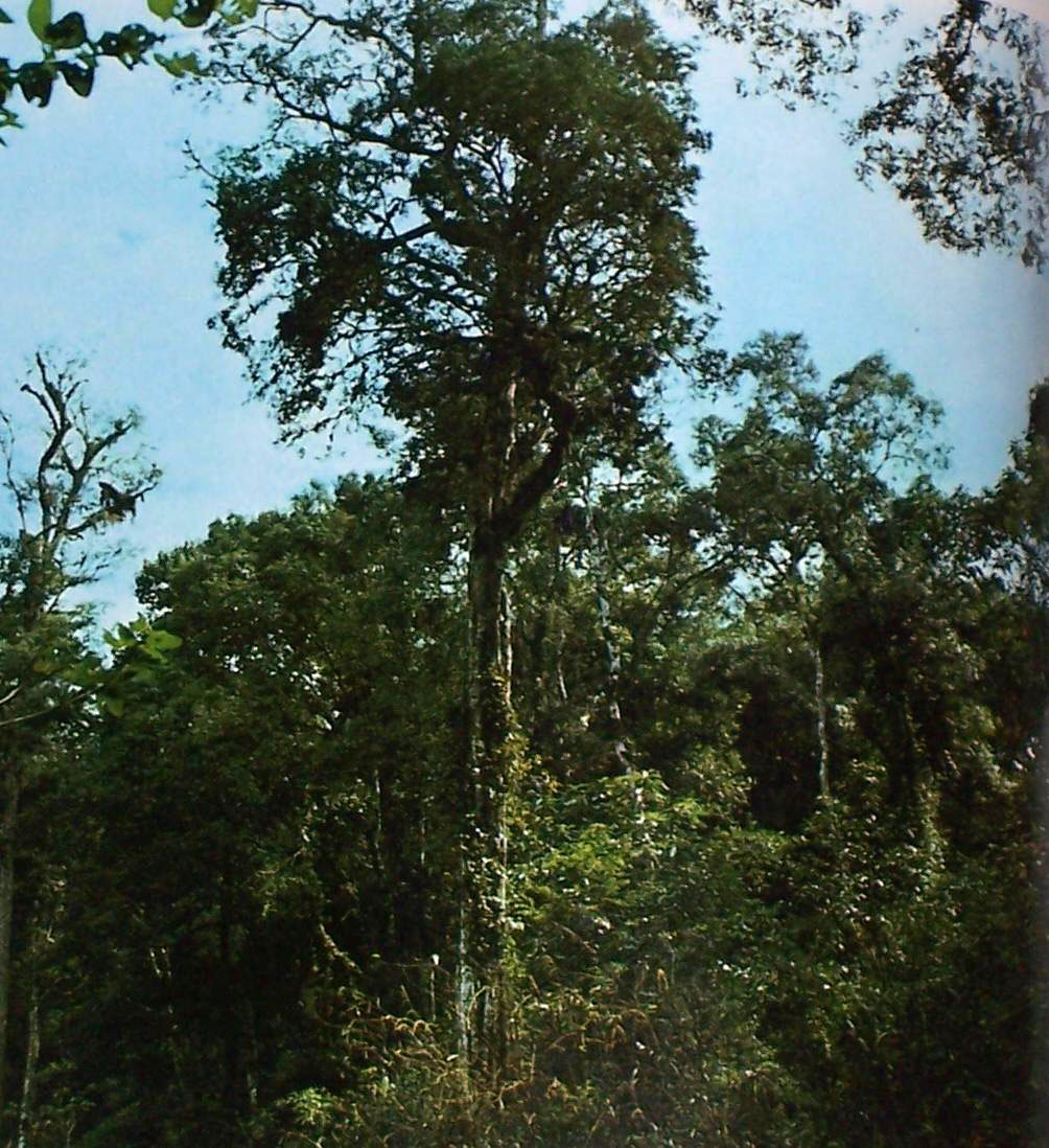 Alecrín o Ibirá-pepé (Holocalyx balansae)